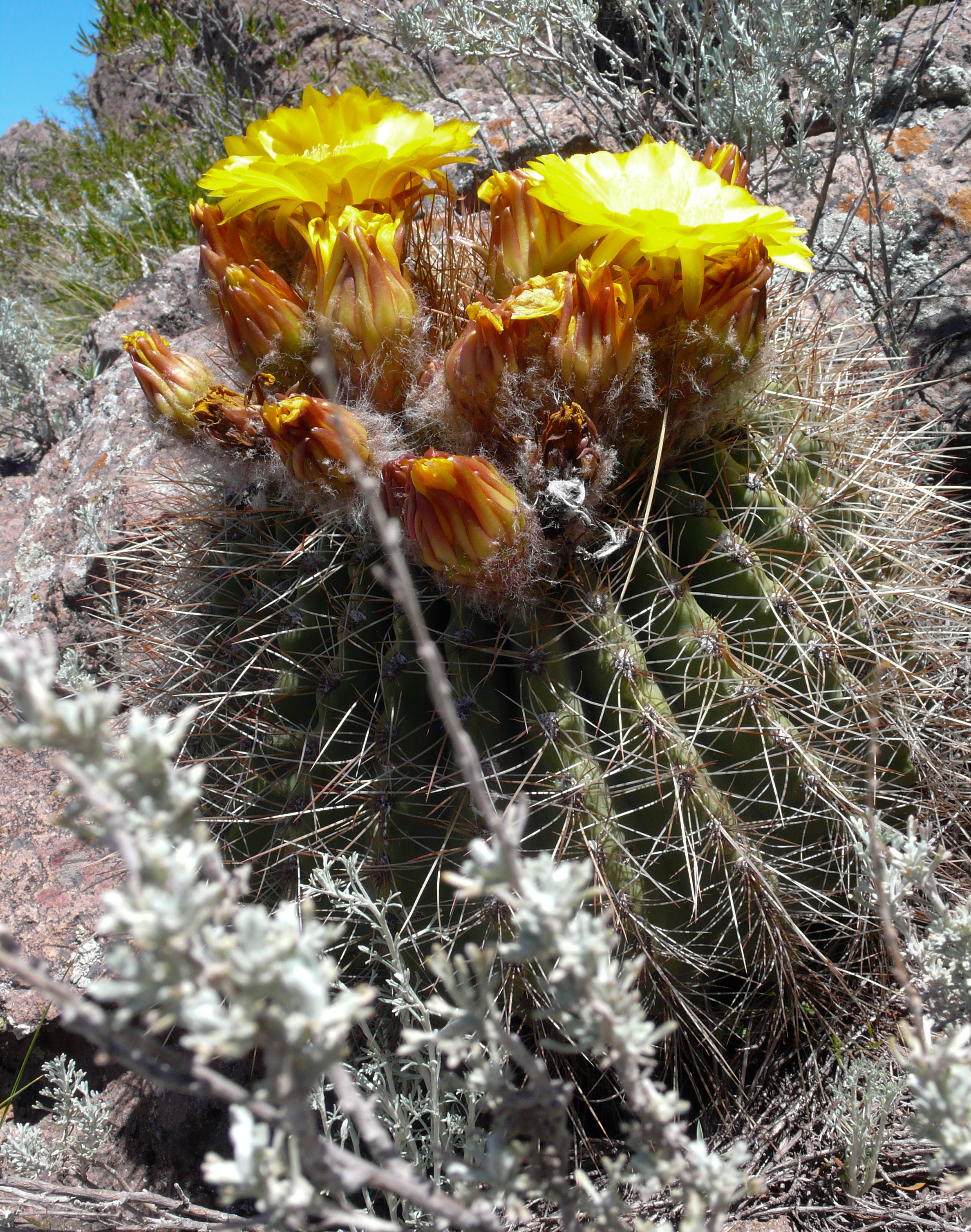 Echinopsis formosa in Medoza, Argentina.